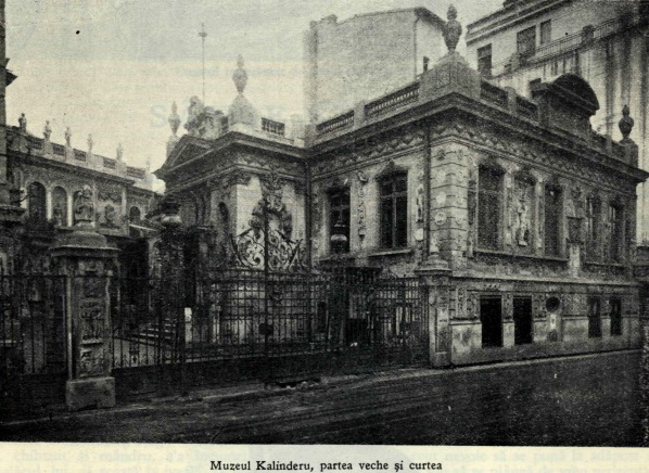 Muzeul Kalinderu de pe strada Vasile Sion nr. 2-4, Bucureșri. Clădirea muzeului este construită între anii 1906-1908 după planurile arhitectului I.D.Berindey, fost arhitect șef al capitalei.